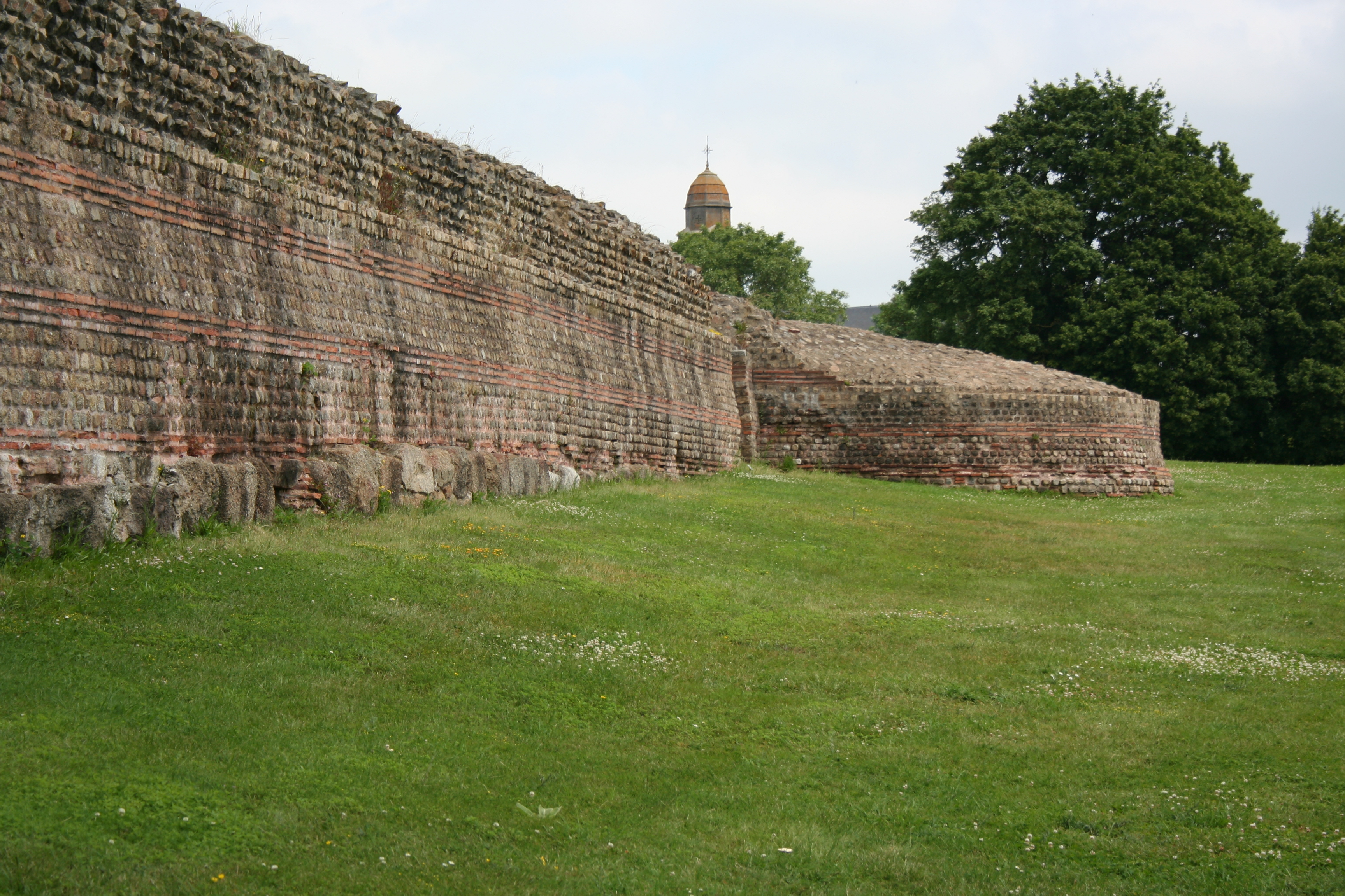 Enceinte extérieure de la forteresse de Jublains, Mayenne. On voit l'église du XIXe siècle à l'arrière-plan.